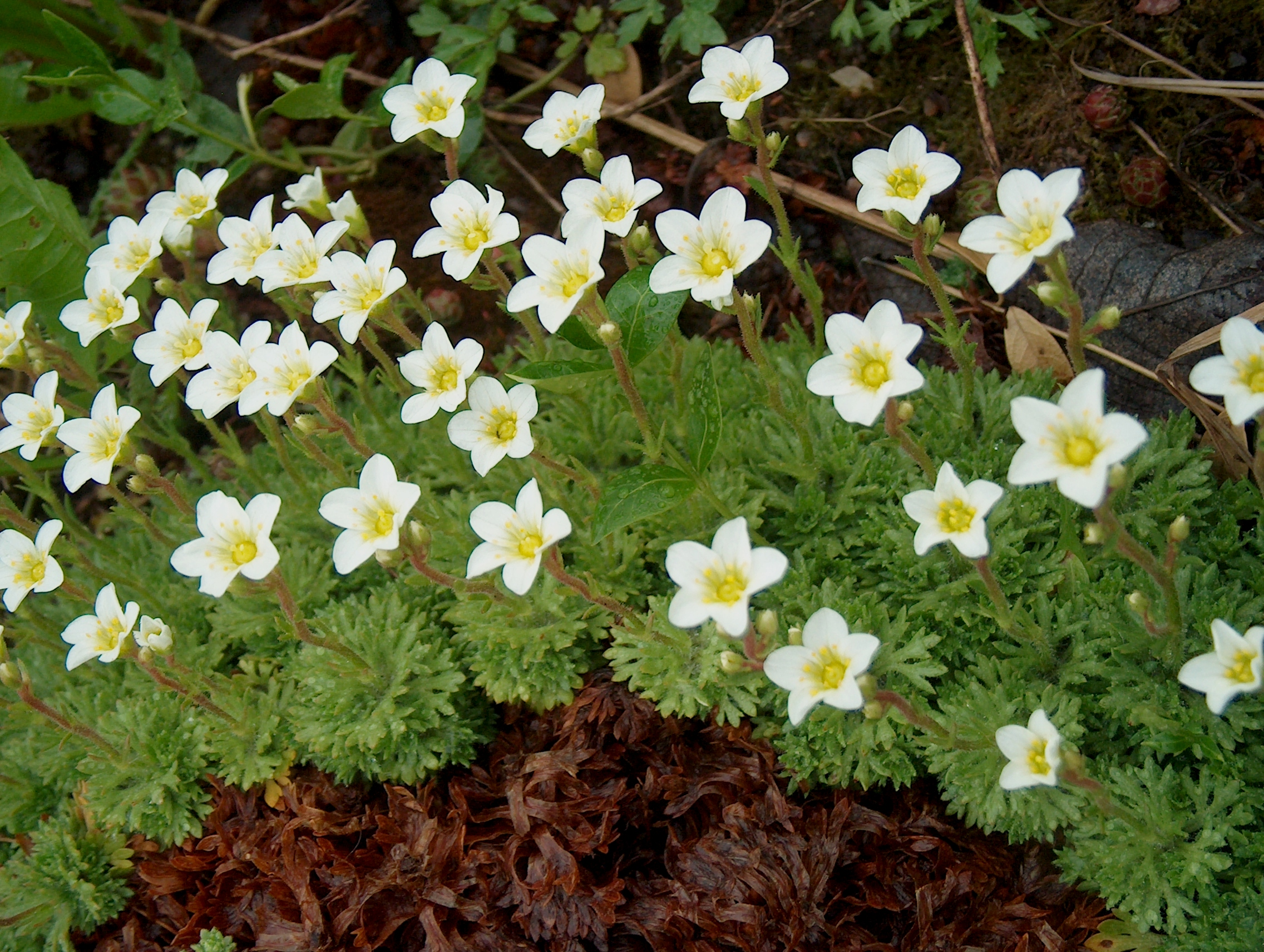 Saxifraga decipiens White - Kerava, Finland